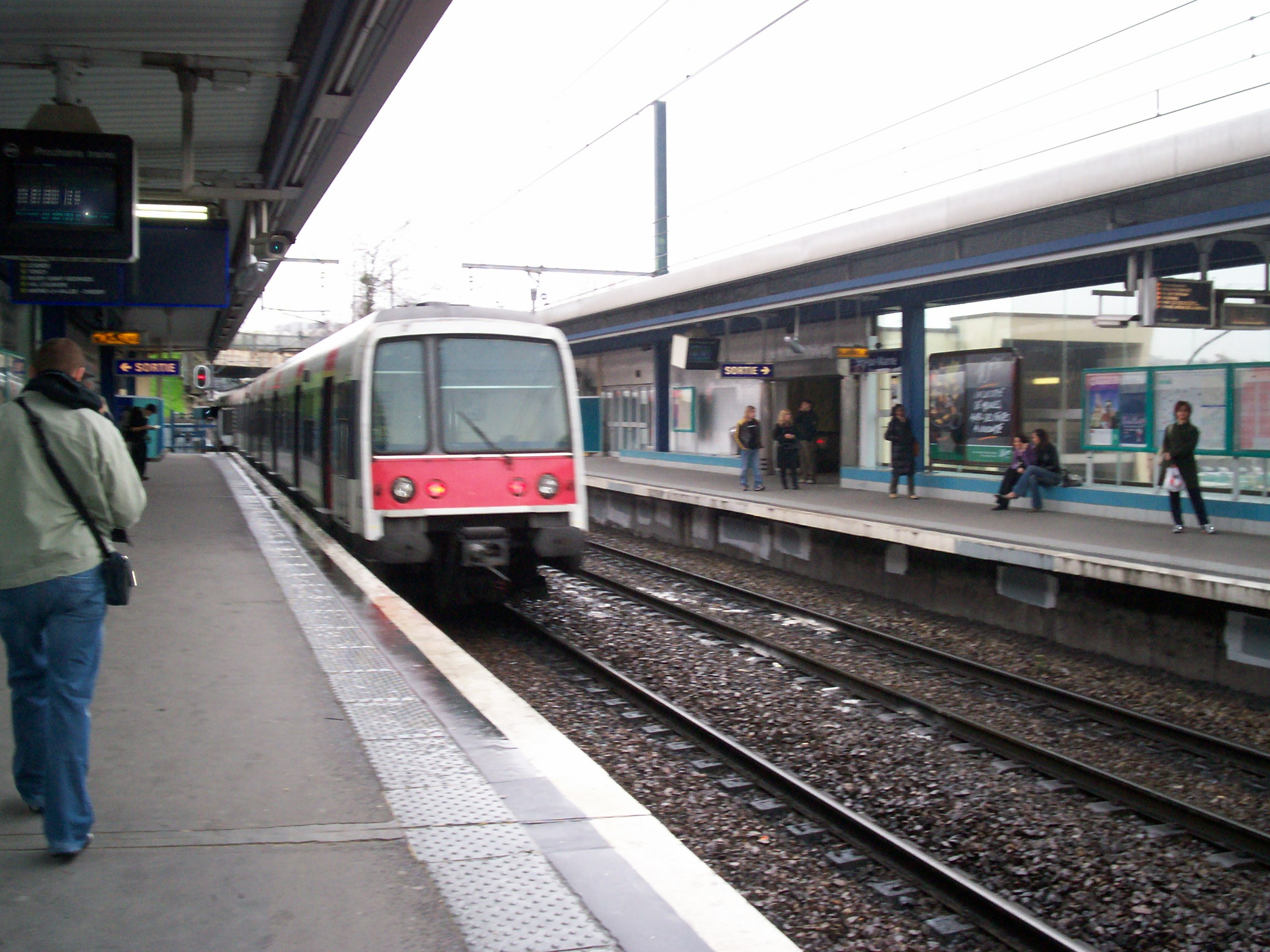 MI 84 - Gare de Bry-sur-Marne